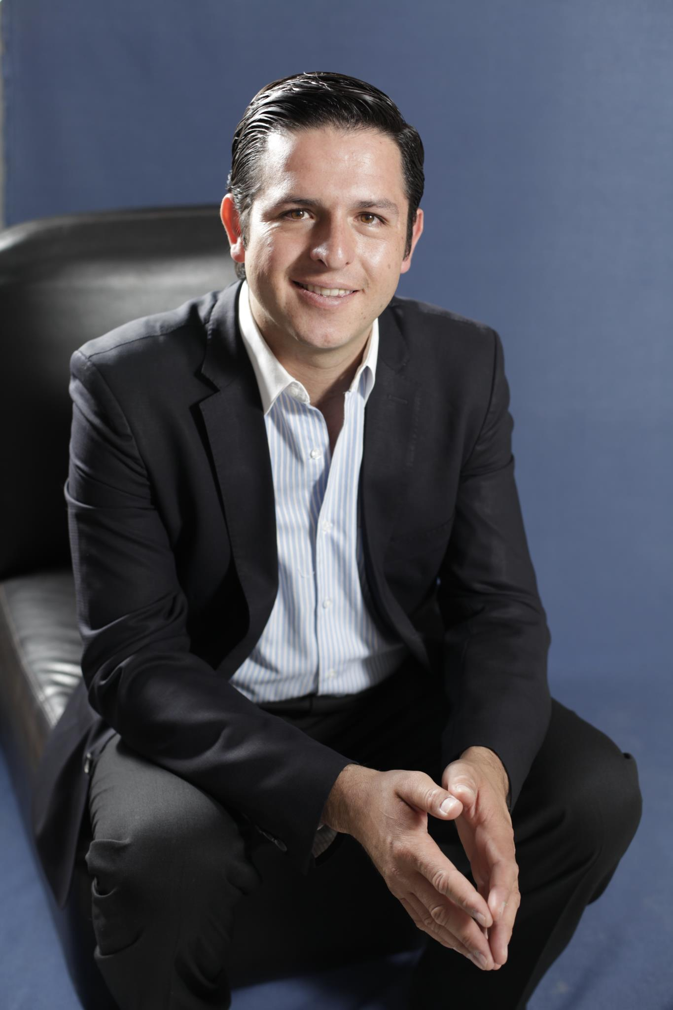 Diputado Federal Distrito XIV Guanajuato